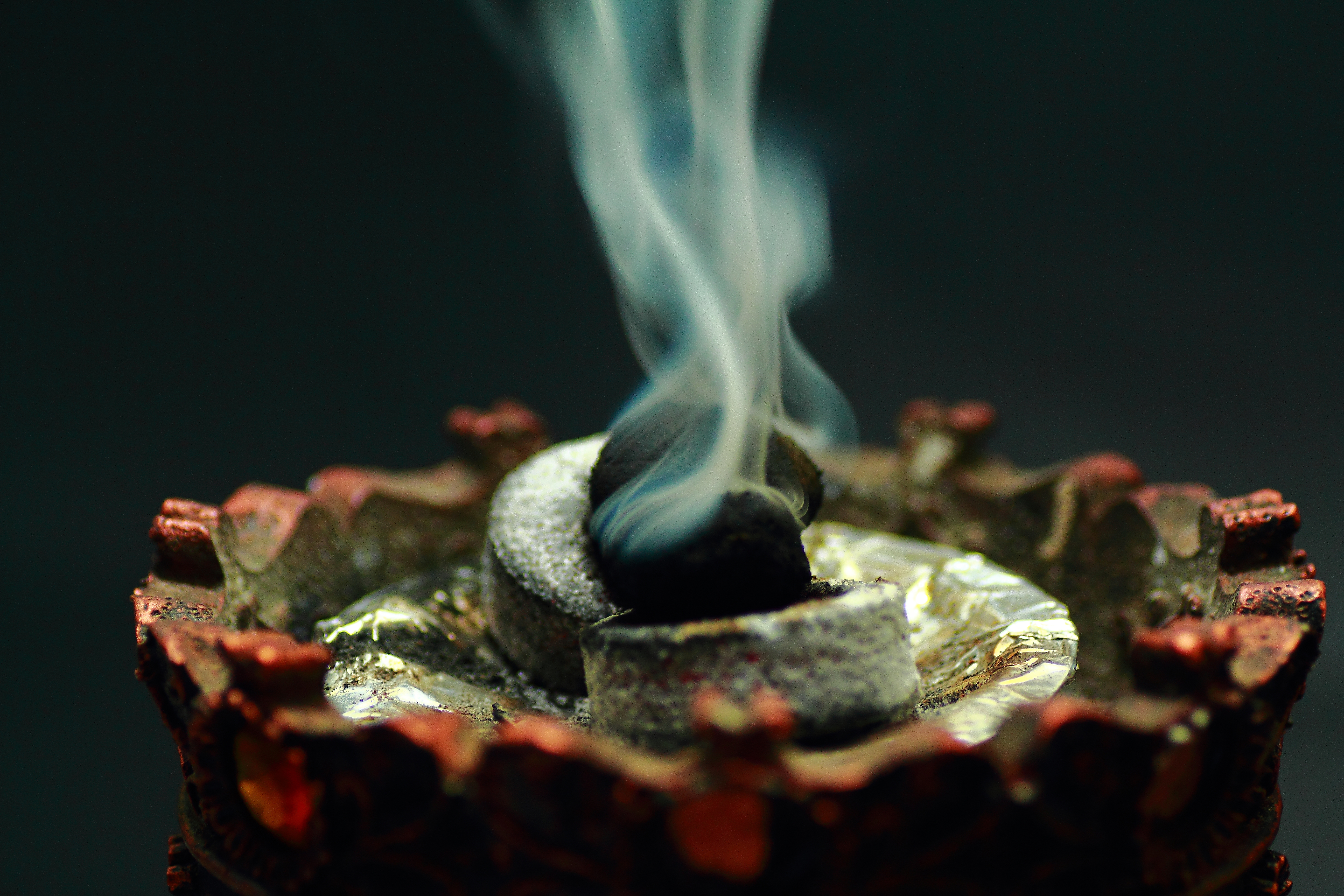 معمول بخور .. أحد أنواع البخور